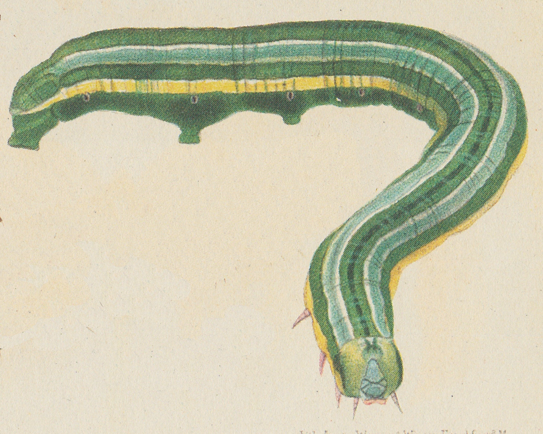 Pungeleria capreolaria